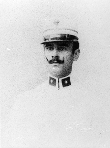 Ο Νικόλαος Κοντογούρης